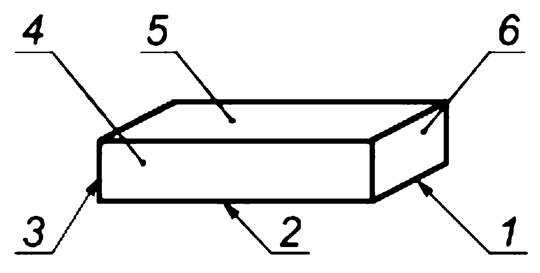 Названия сторон кирпича: 1 — ширина, 2 — длина, 3 — толщина, 4 — ложок, 5 — постель, 6 — тычок.